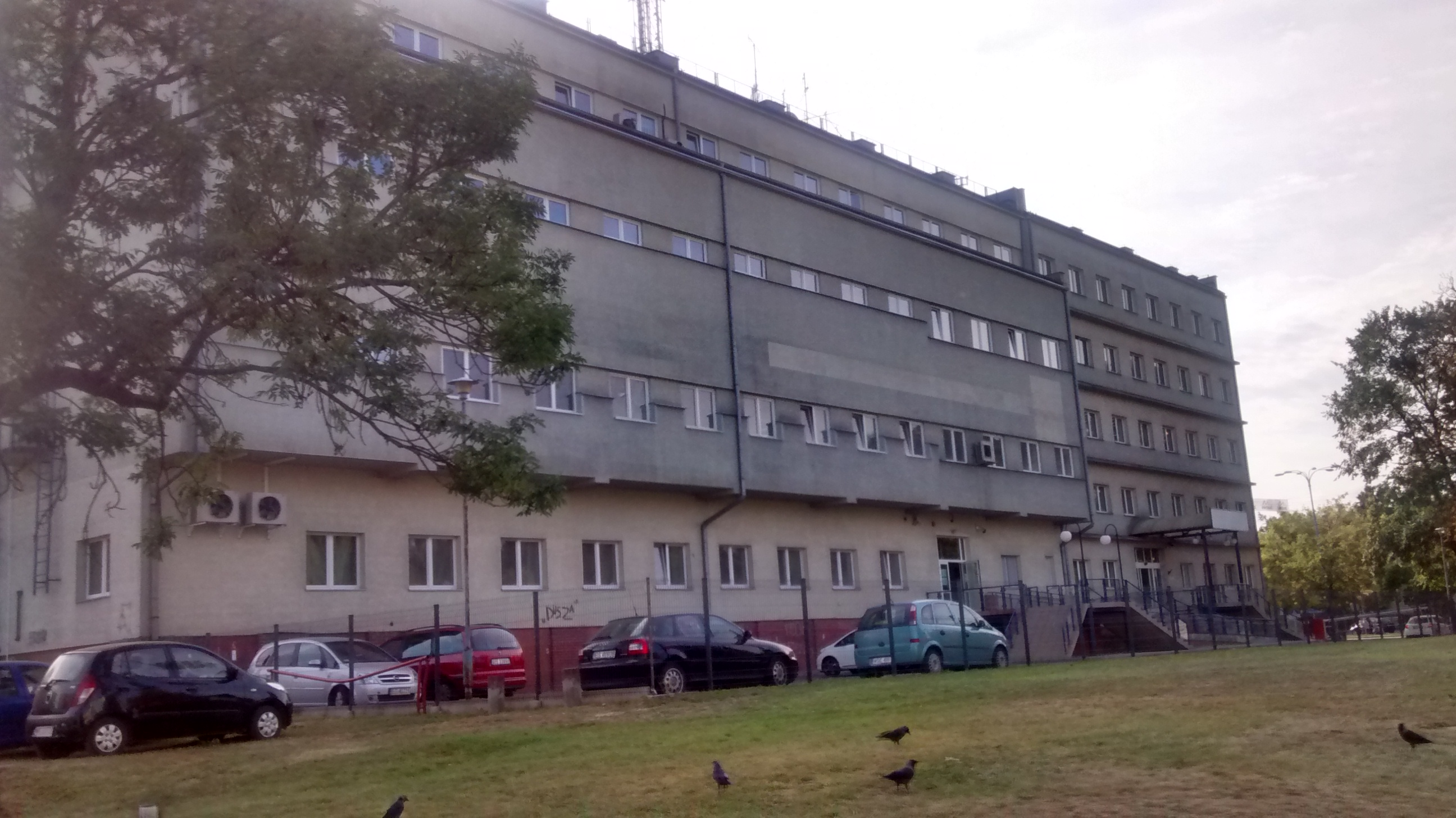 Budynek Telekomunikacji Orange (dawniej Telekomunikacji Polskiej)